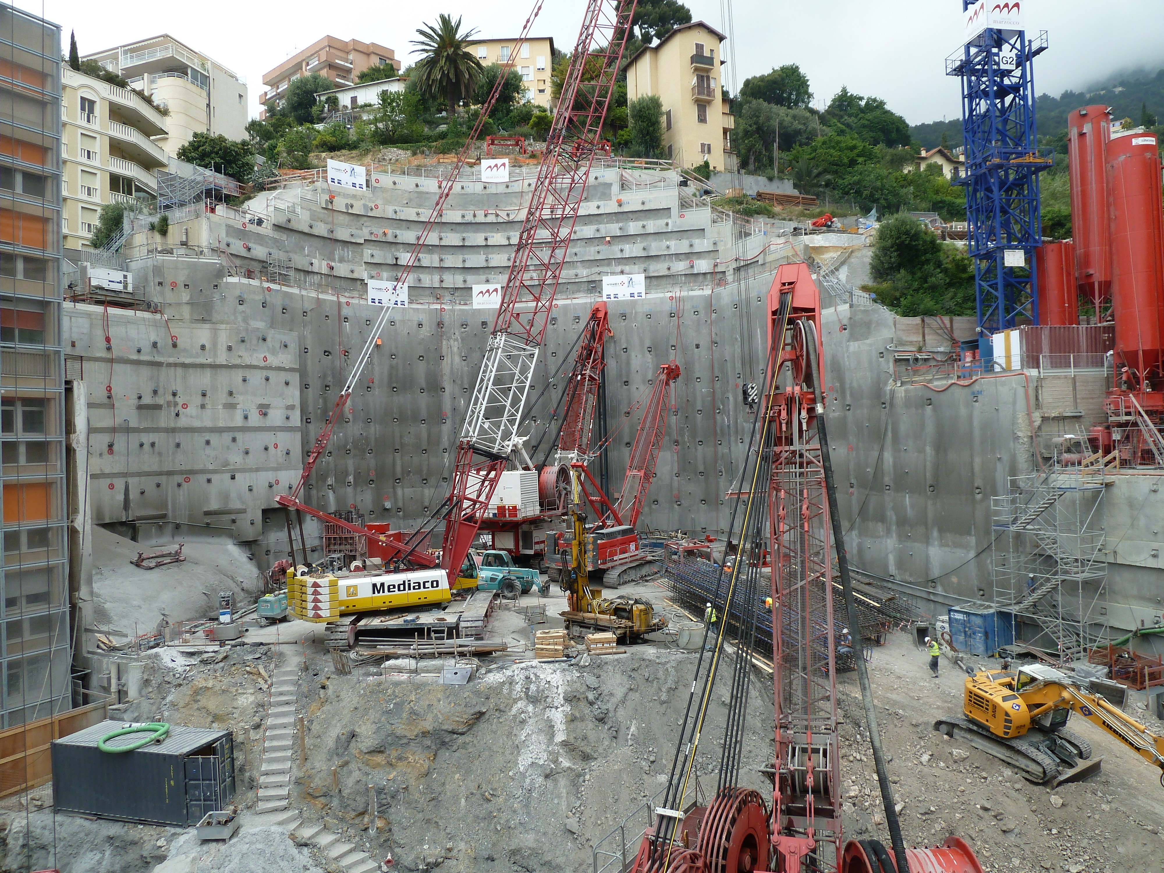 Photo Chantier Tour Odéon au 12 mai 2011